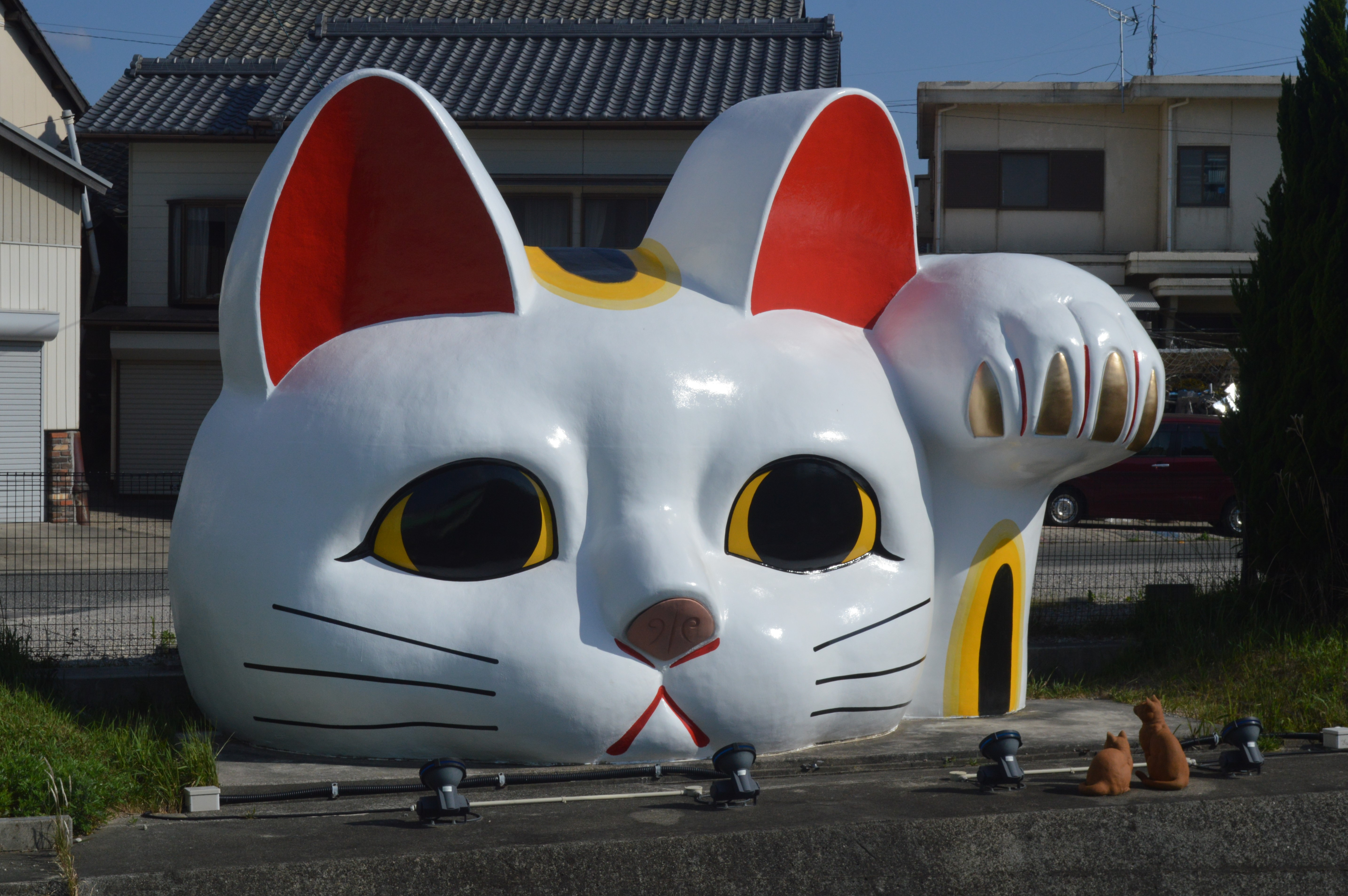 愛知県常滑市の常滑やきもの散歩道にある招き猫「とこにゃん」。